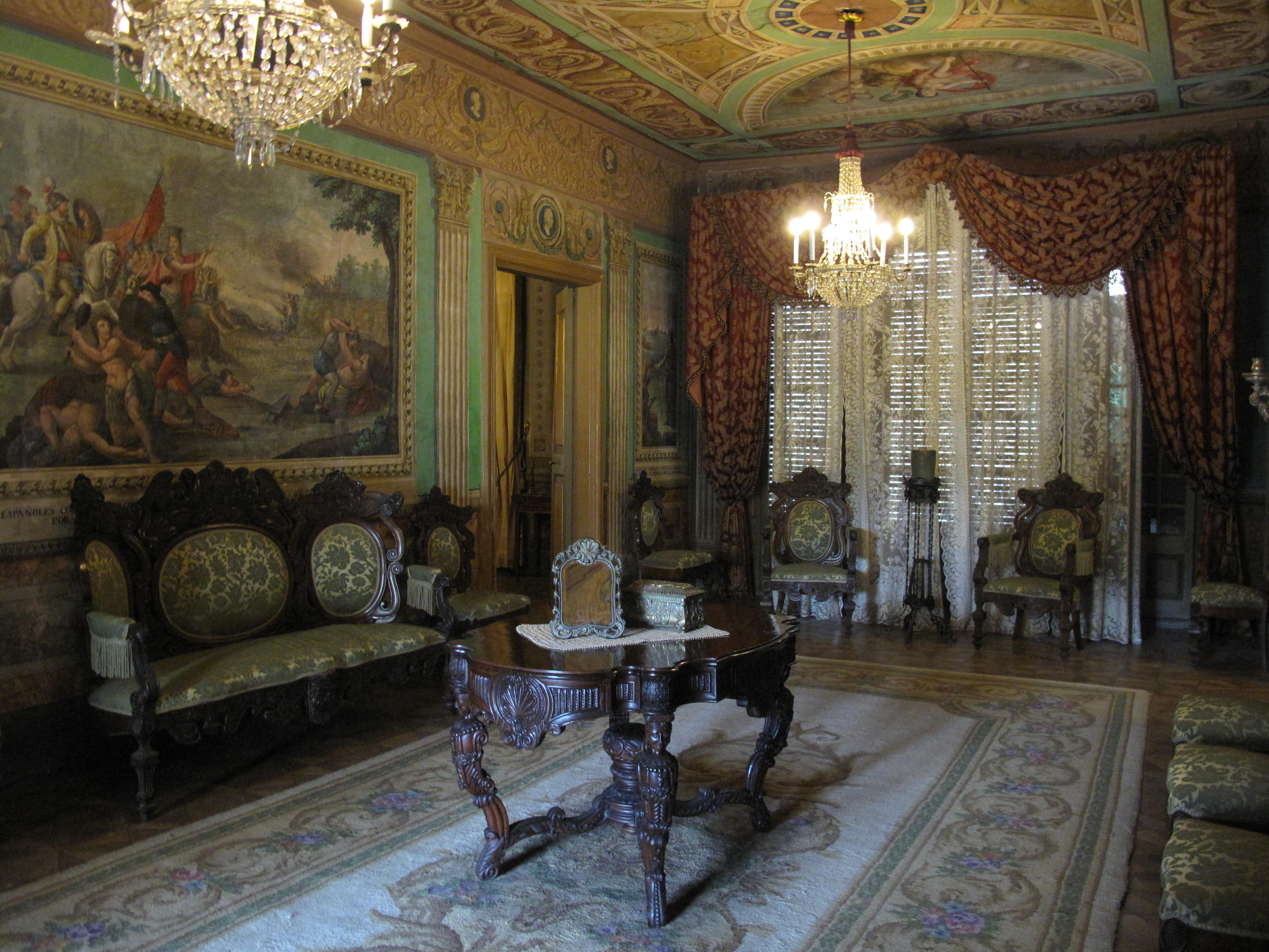 Casa Alegre de Sagrera (Terrassa), saló amb decoració vuitcentista, amb escenes sobre la conquesta de Mèxic